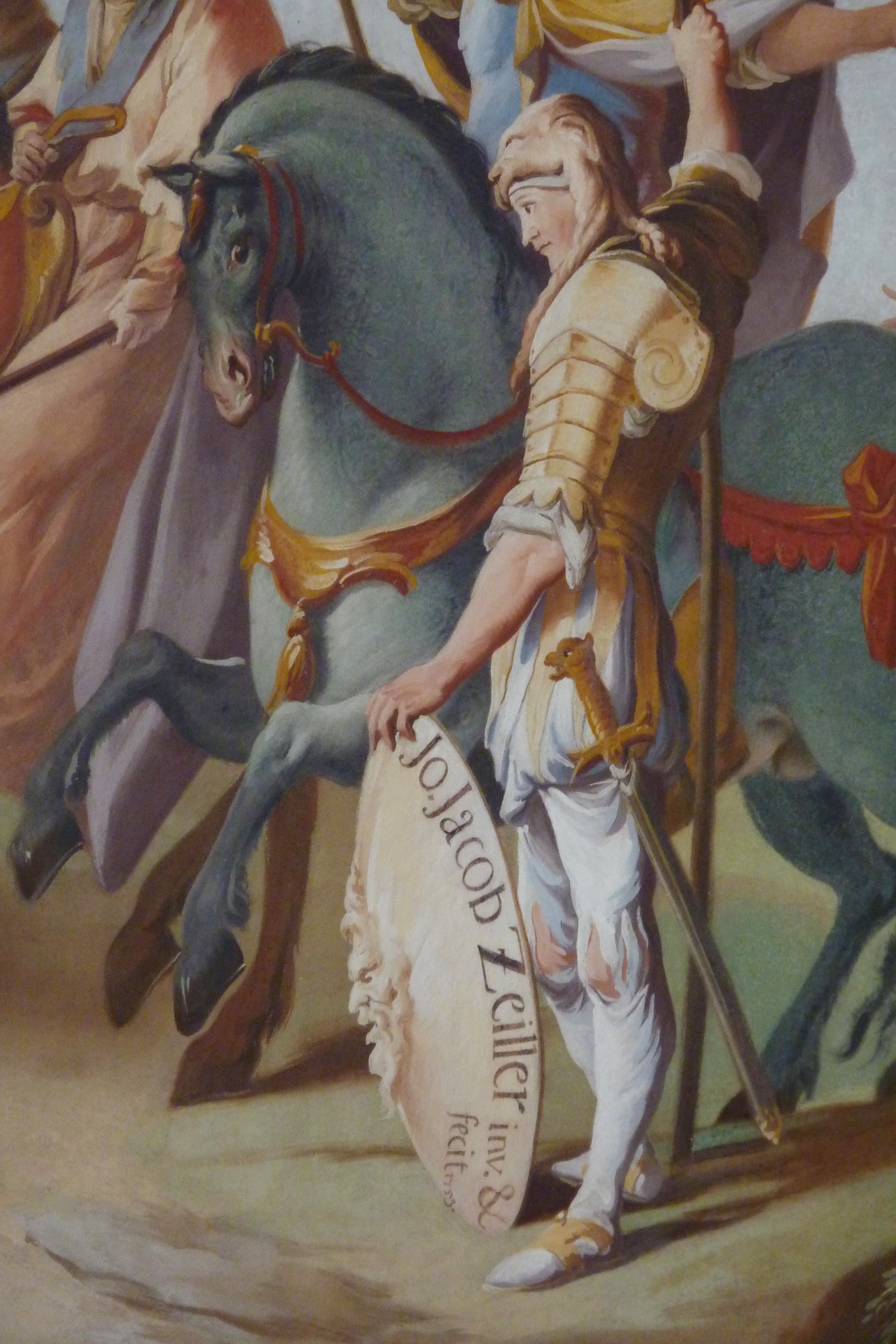 Katholische Kuratiekirche St. Georg in Bichl im Landkreis Bad Tölz-Wolfratshausen (Bayern/Deutschland), Deckenfresko von Johann Jakob Zeiller, von 1753, bezeichnet: „Jo. Jacob Zeiller inv. et fecit 1753“; Darstellung: Signatur